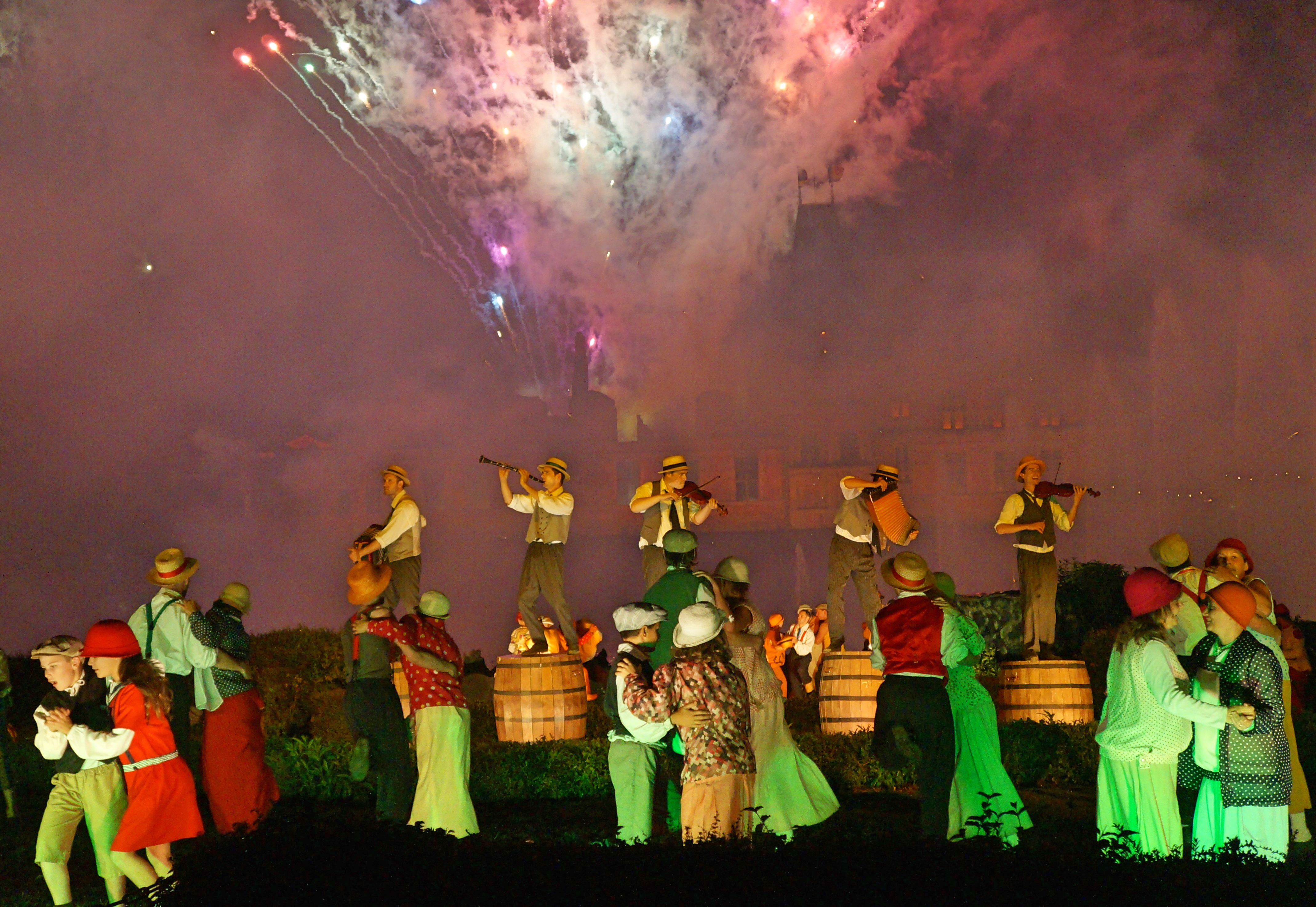 Le Bal 1930 : c'est jour de fête, les Vendéens dansent au son du violon et de l'accordéon sur la musique du spirou dans cette période florissante d'entre deux guerres. La Cinéscénie Le Puy du Fou Les Epesses.-.Vendée, France This photo has been taken in the country: France